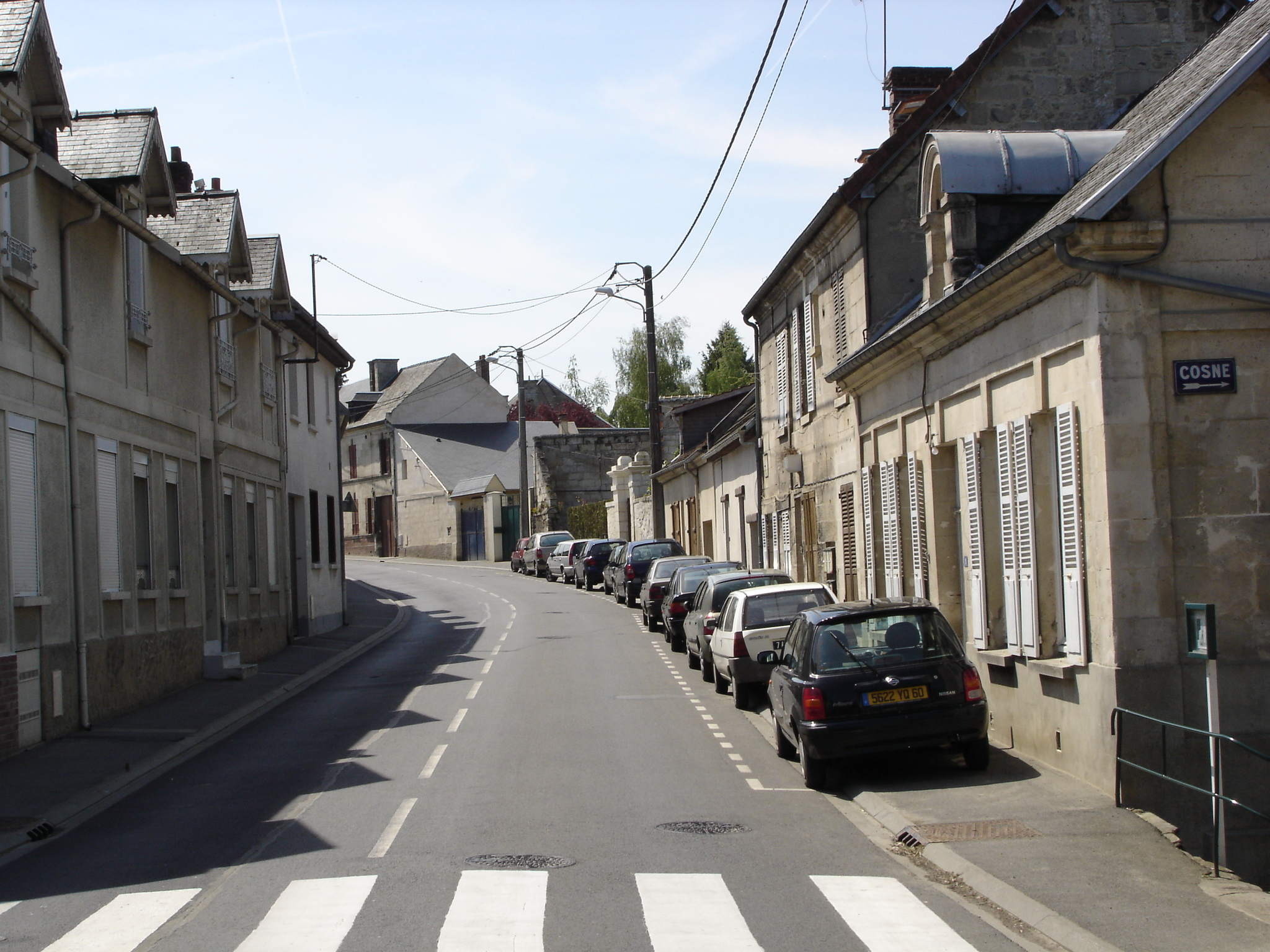 Tracy-le-Mont - Photo amateur prise par moi-même